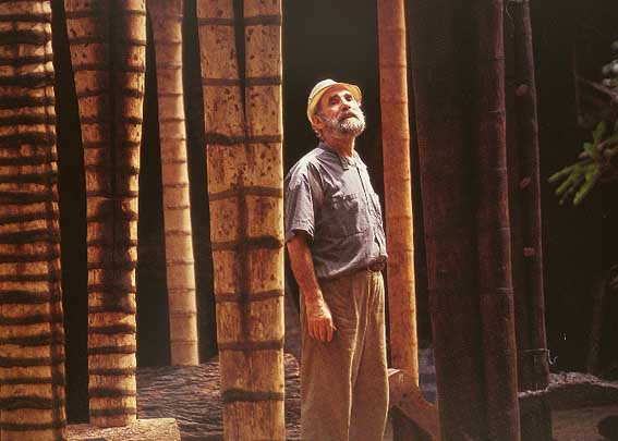 Portrait du sculpteur Frans Krajcberg